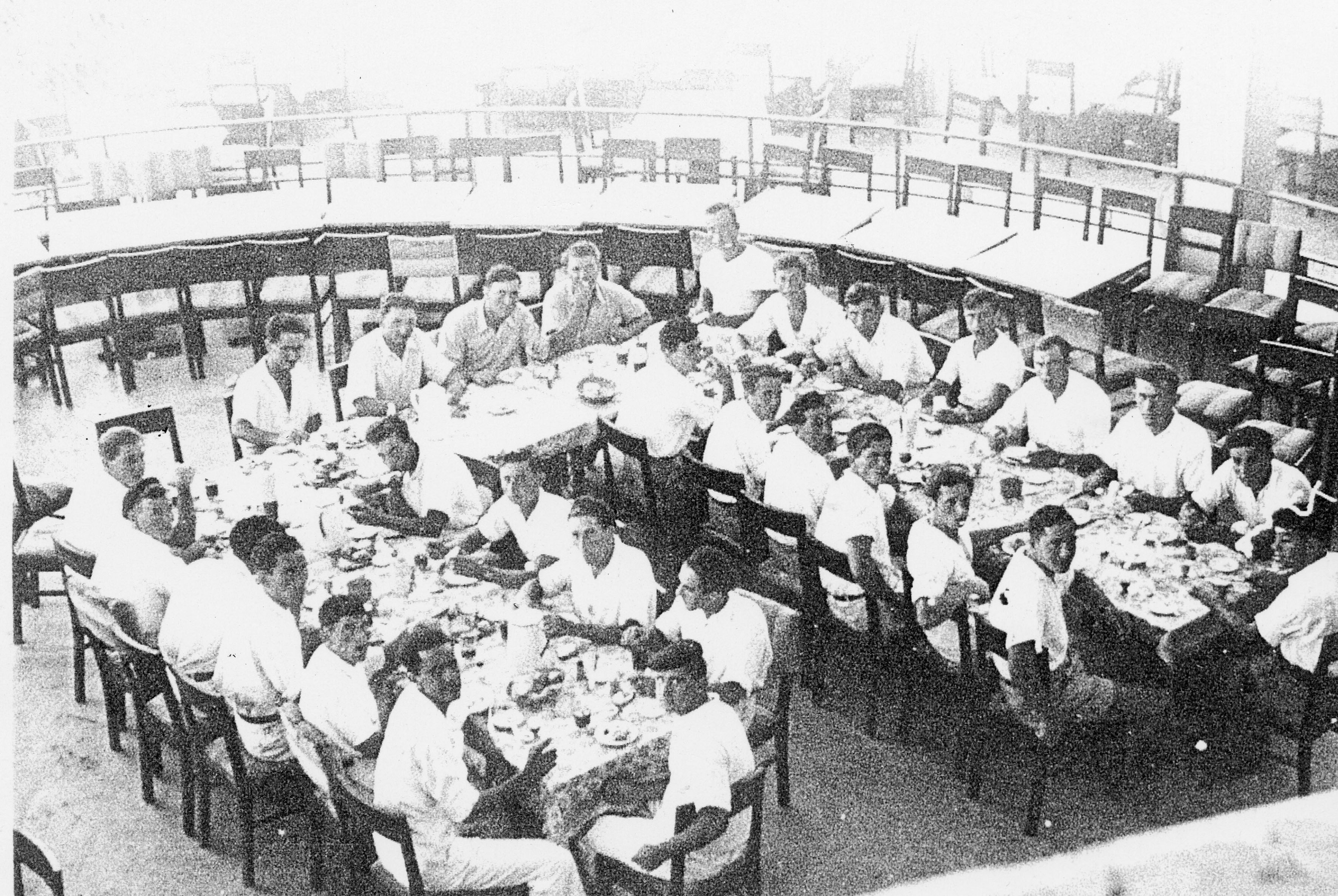 כ"ג יורדי הסירה בארוחת פרידה לפני היציאה לים 17 במאי 1941